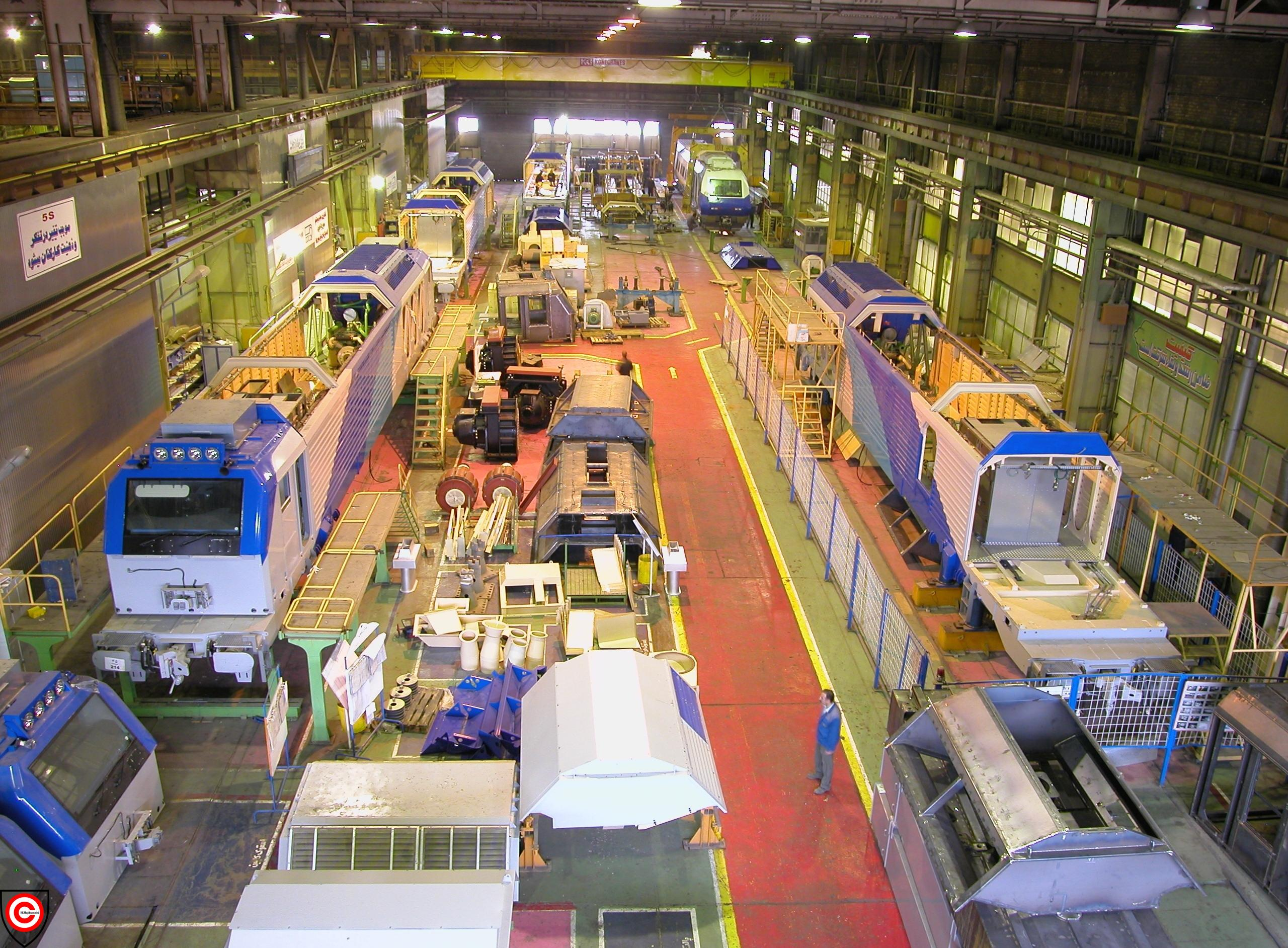 Wagon Pars co- Arak .Iran کارخانه واگن پارس